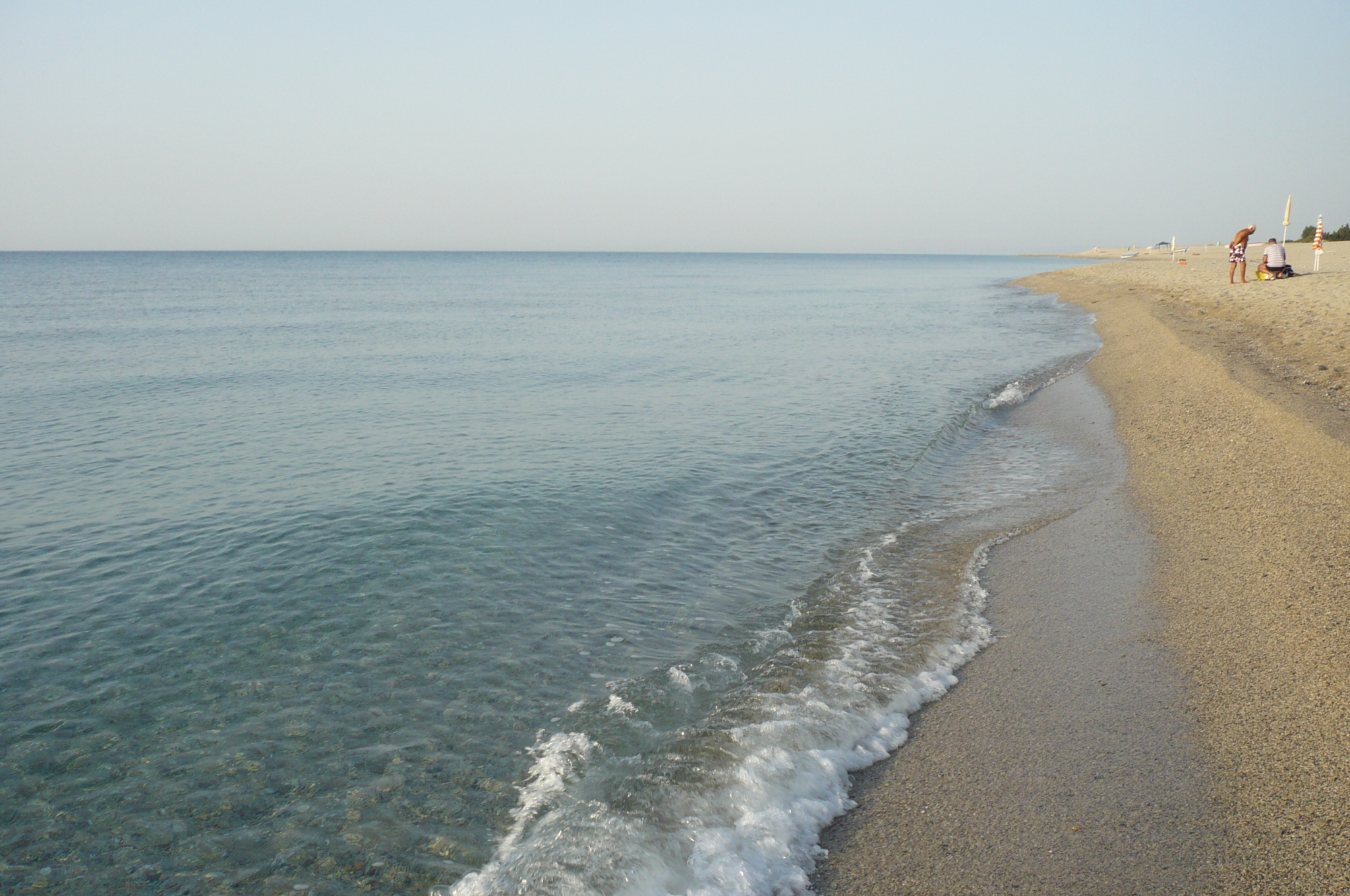 Plage de la côte